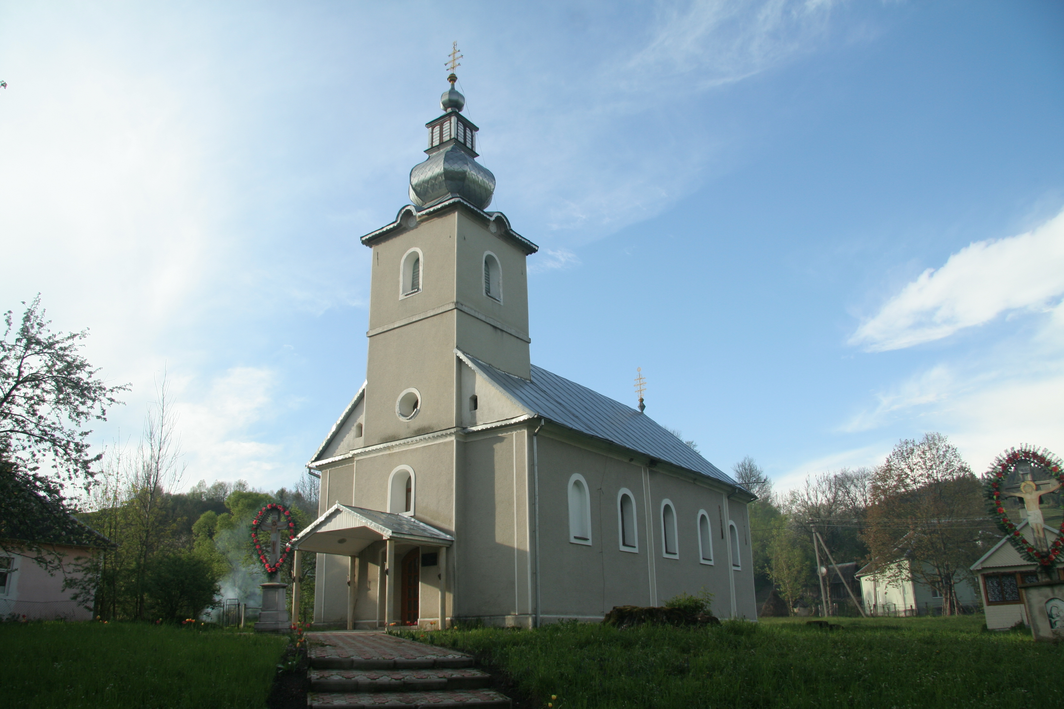 загальний видляд камяної церкви з дороги Т0718